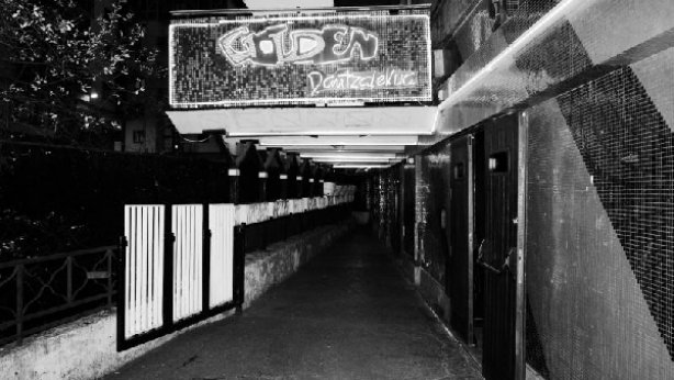 Golden Urretxu